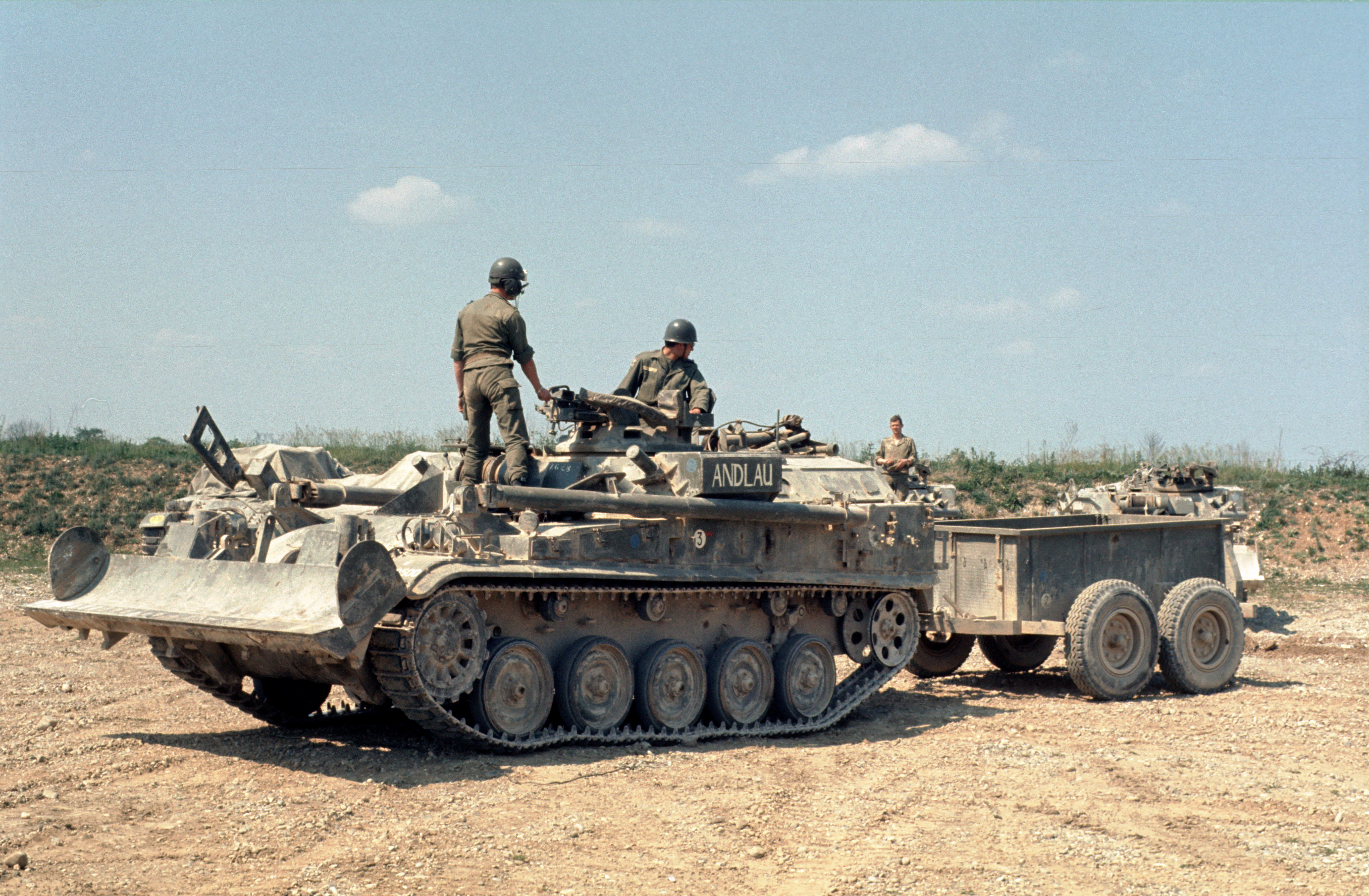 026 Retour de manoeuvre des VCG de la 9/3.